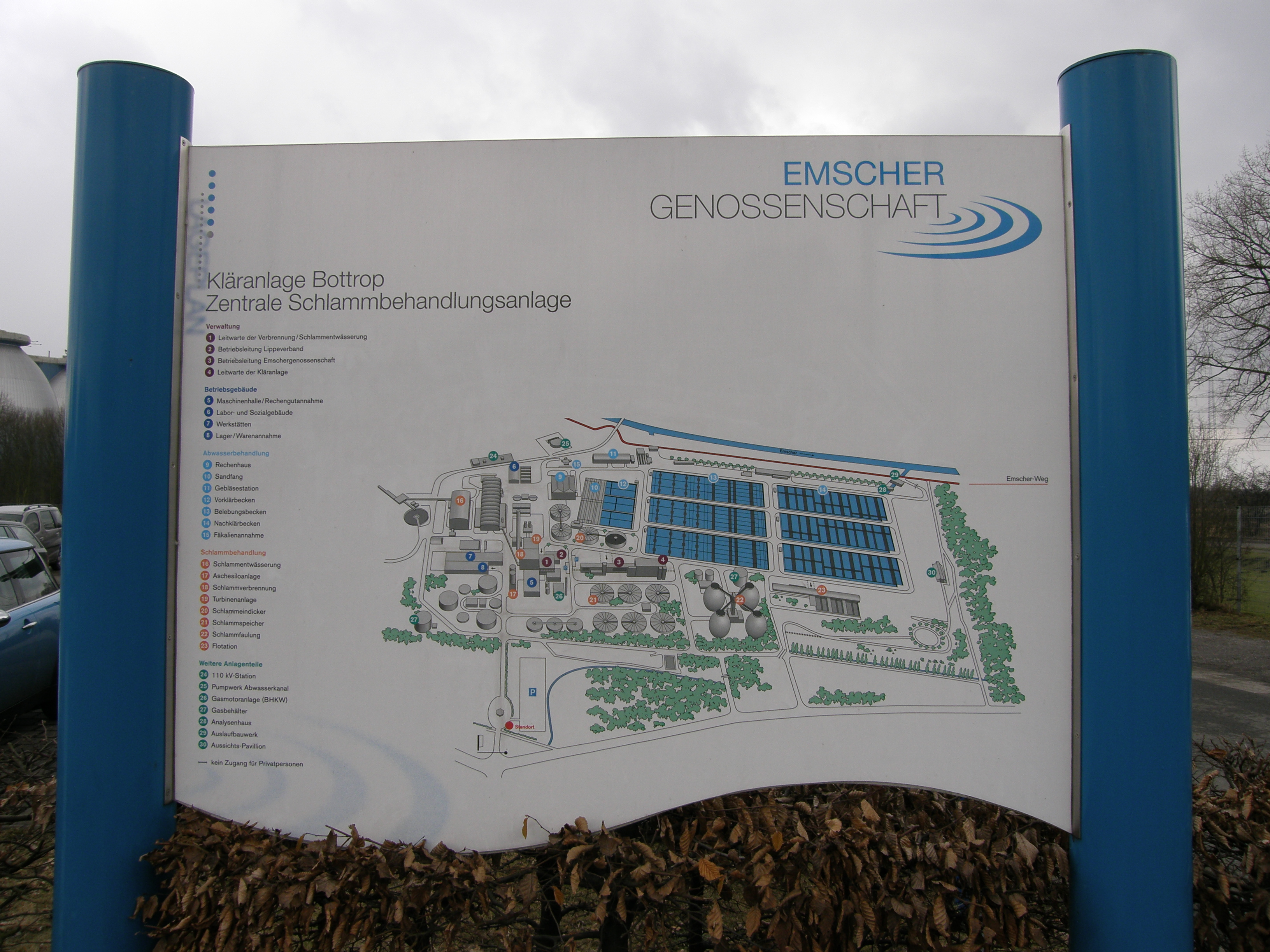 Emscherklärwerk in Bottrop Informationsschild am Eingang/Parkplatz